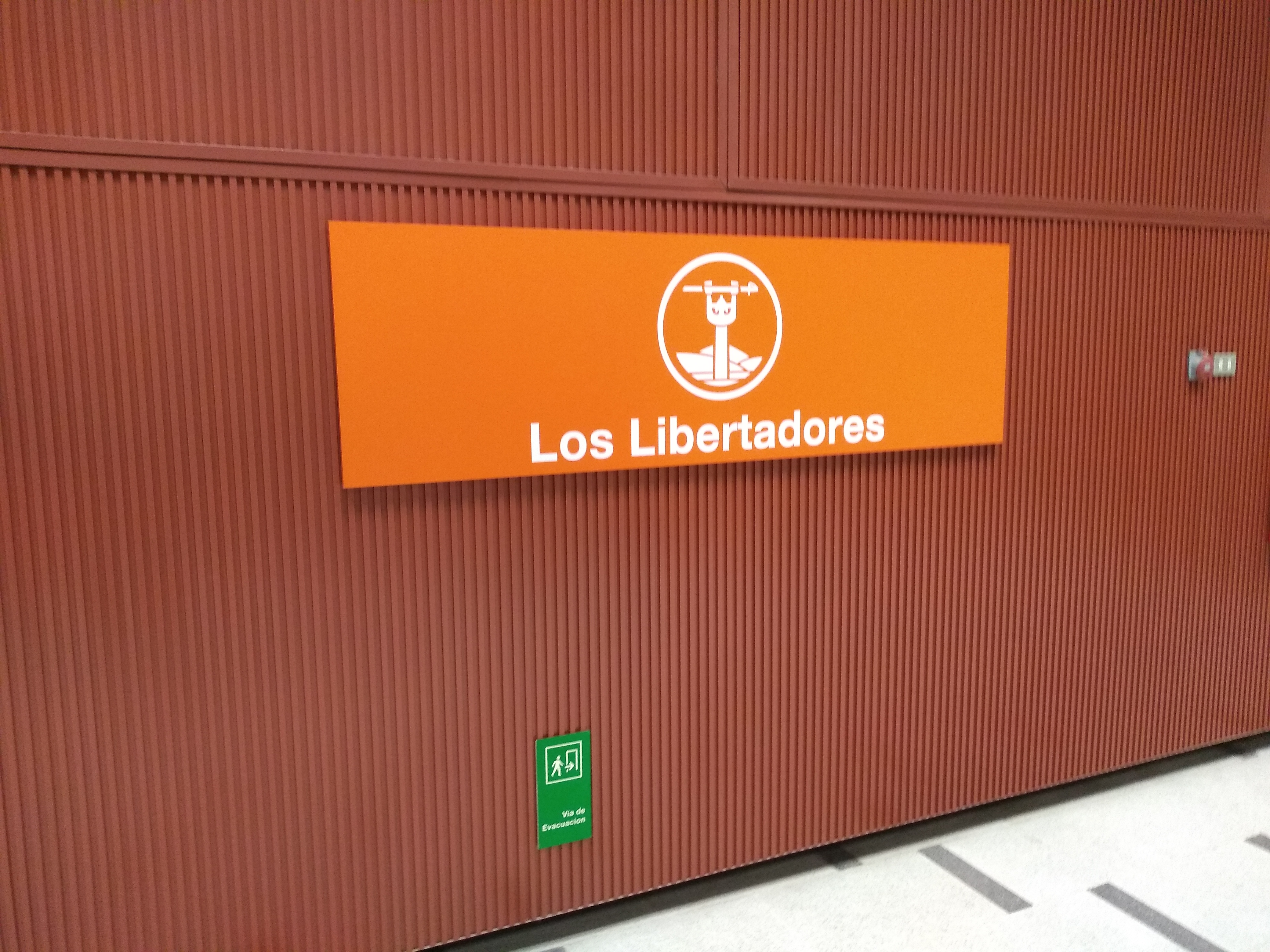 Anden estación Los Libertadores